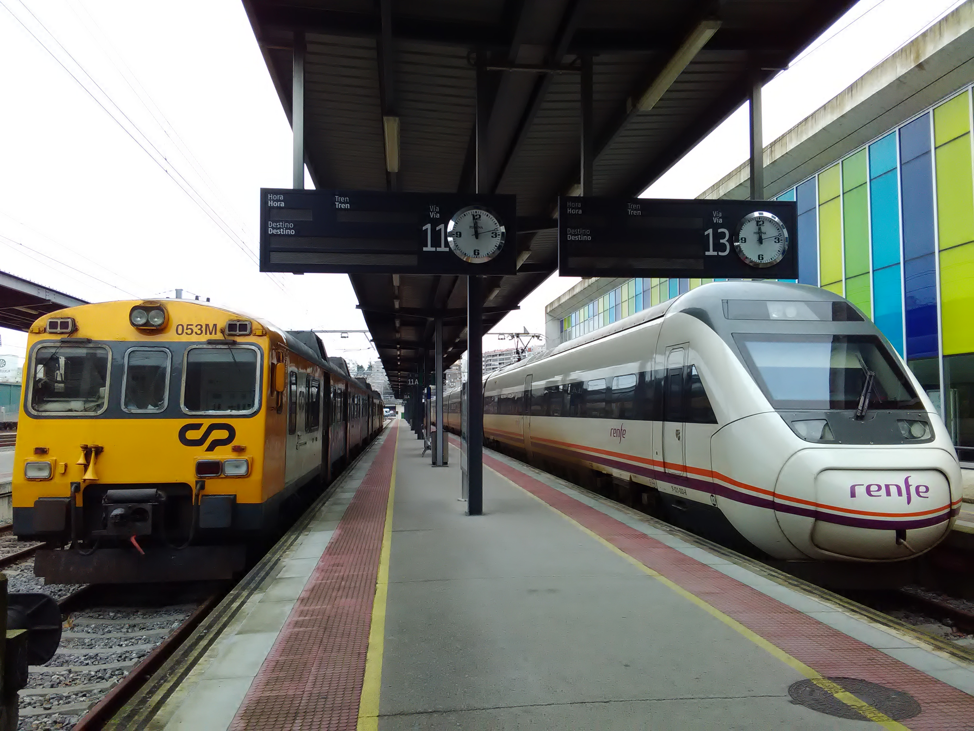 Automotora da série 592 da CP que efectuou o serviço Celta estacionada na estação de Vigo-Guixar ao lado de uma automotora da série 599 da RENFE, afecta ao serviço regional Vigo-Corunha.